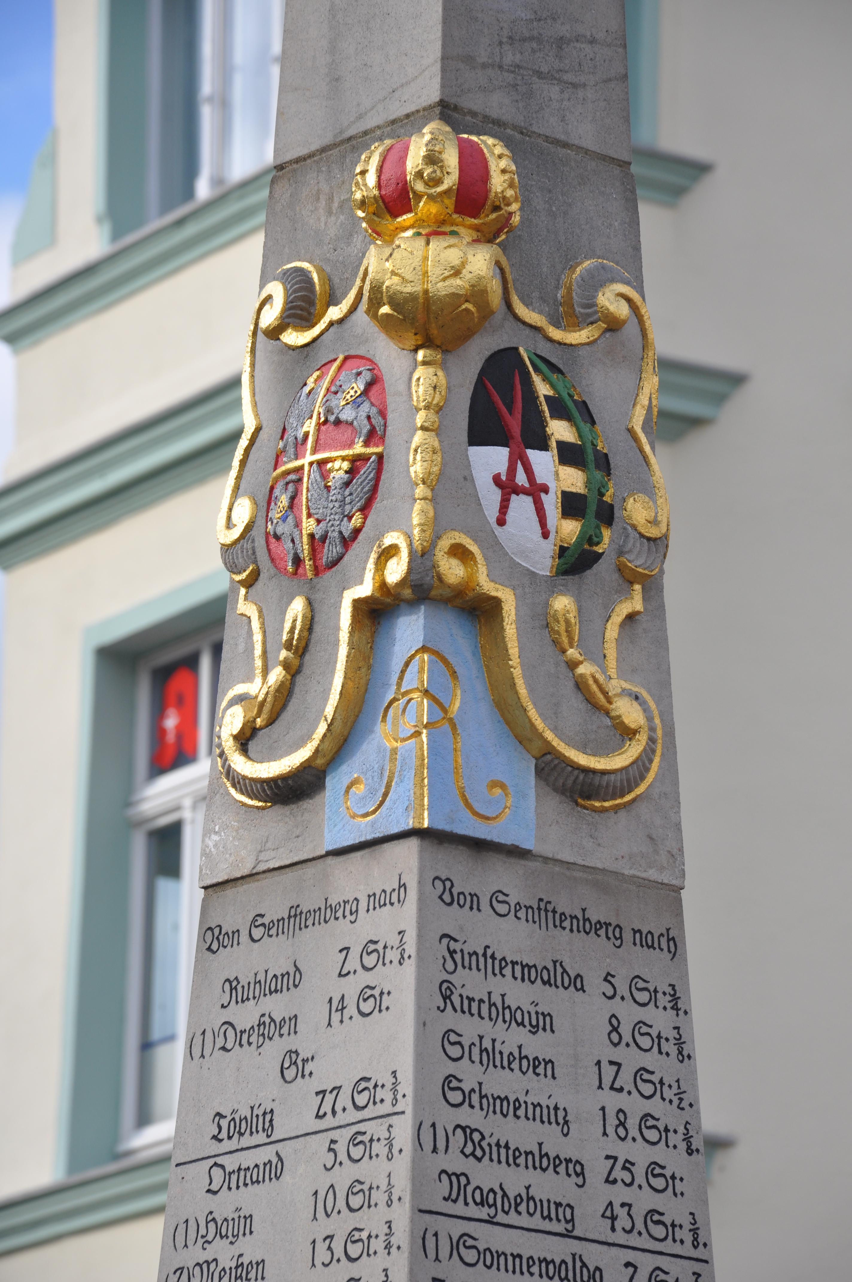 Senftenberg (Brandenburg), Markt, Sächsische Postmeilensäule